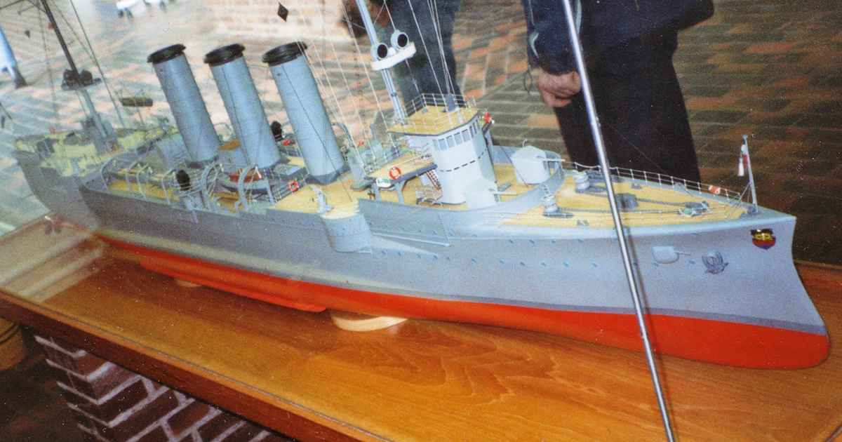 Beschreibung: Modell des Kleinen Kreuzers Emden (Stapellauf: 1908) / Model of the Small Cruiser Emden (1908) / Laboe Naval Memorial